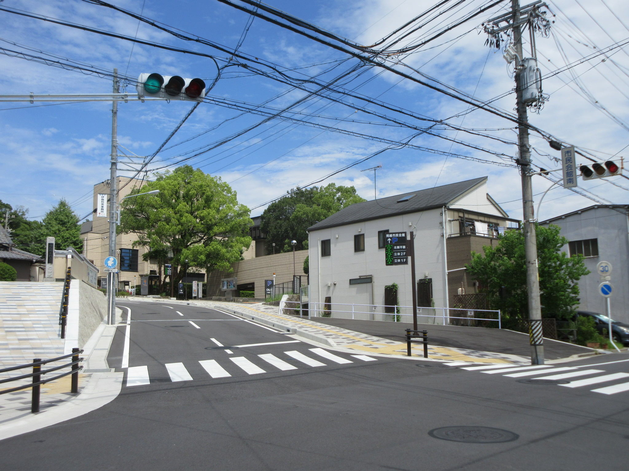 市民会館南交差点。2016年に歩道を拡張。